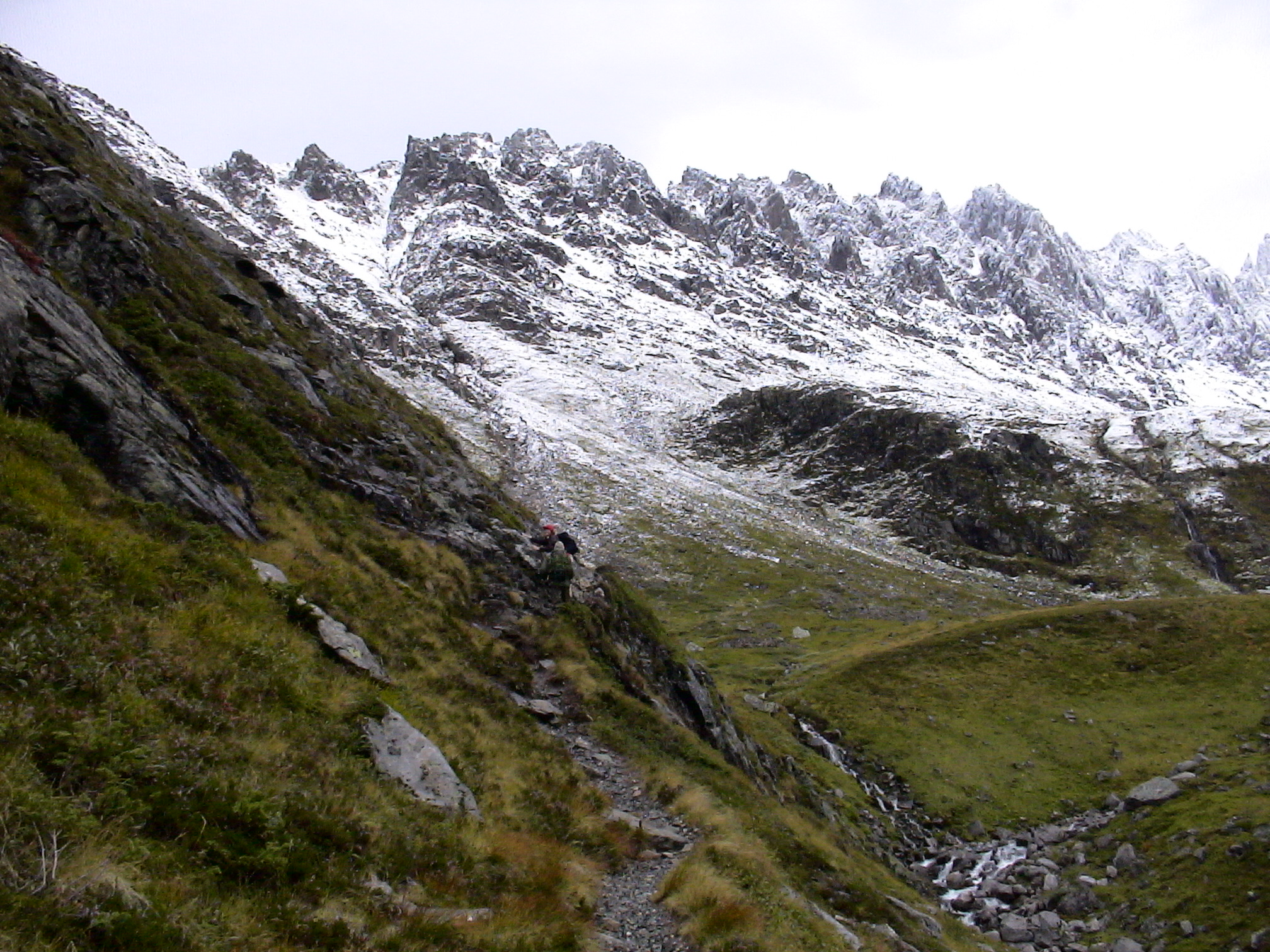 Ei fin samling Sunnmørsalpar finn ein i Molladalen.